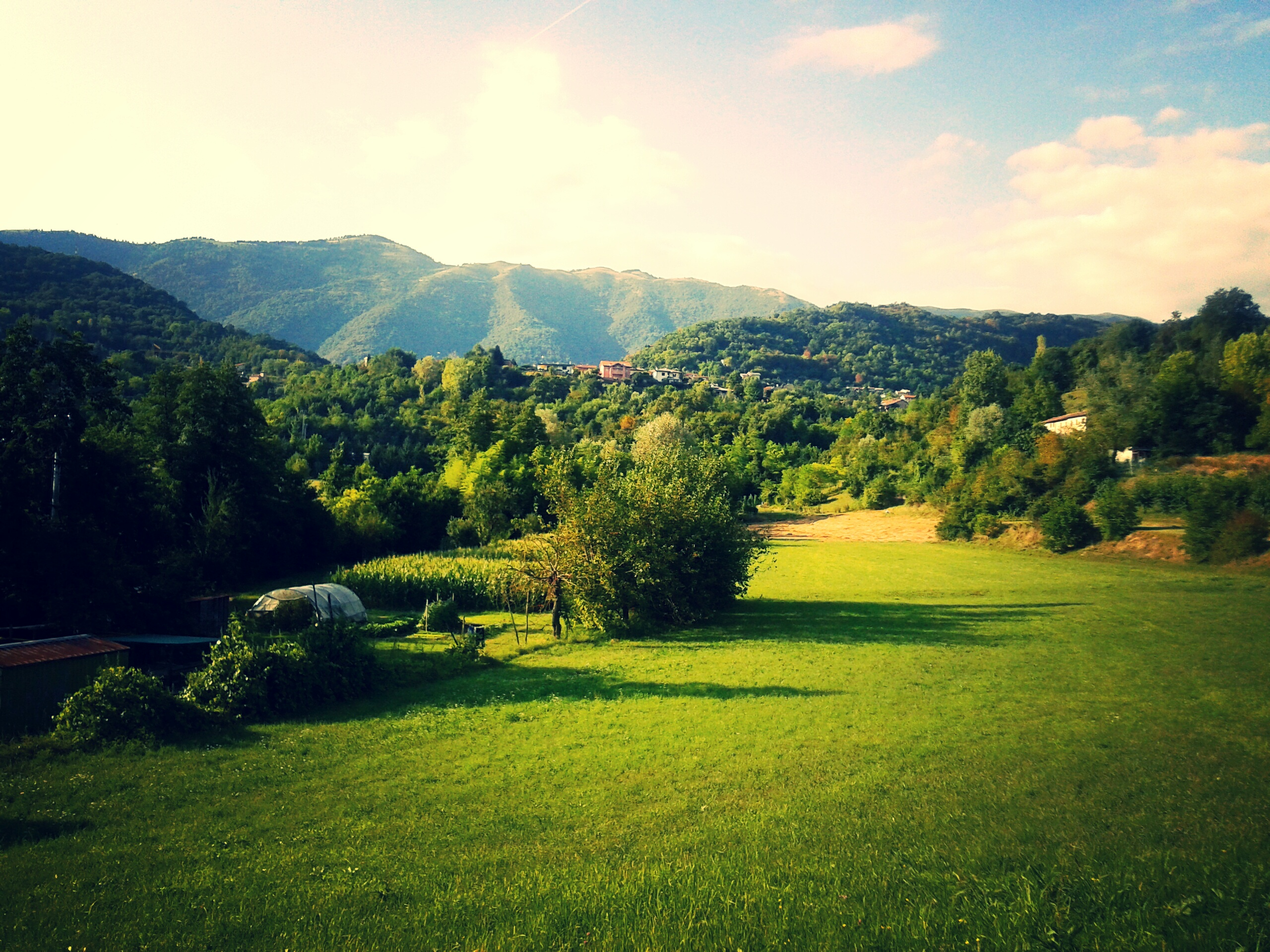 Paesaggio collinare di Tarzo